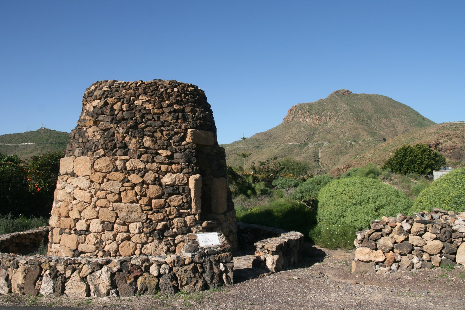 Horno de teja